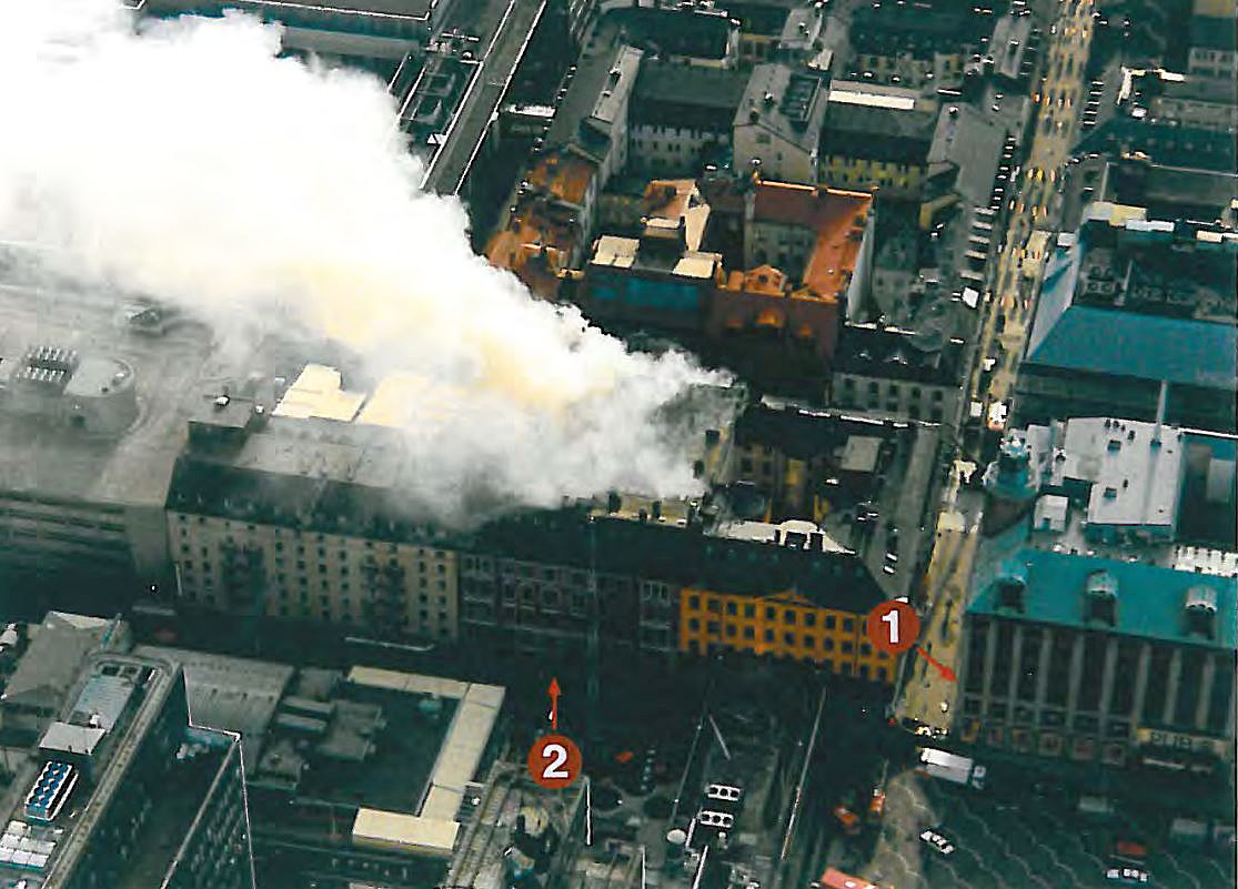 Polisfoto i haveriutredningens Rapport 1994:2*1: Varuhuset PUB*2: Sjöjdgatan 9